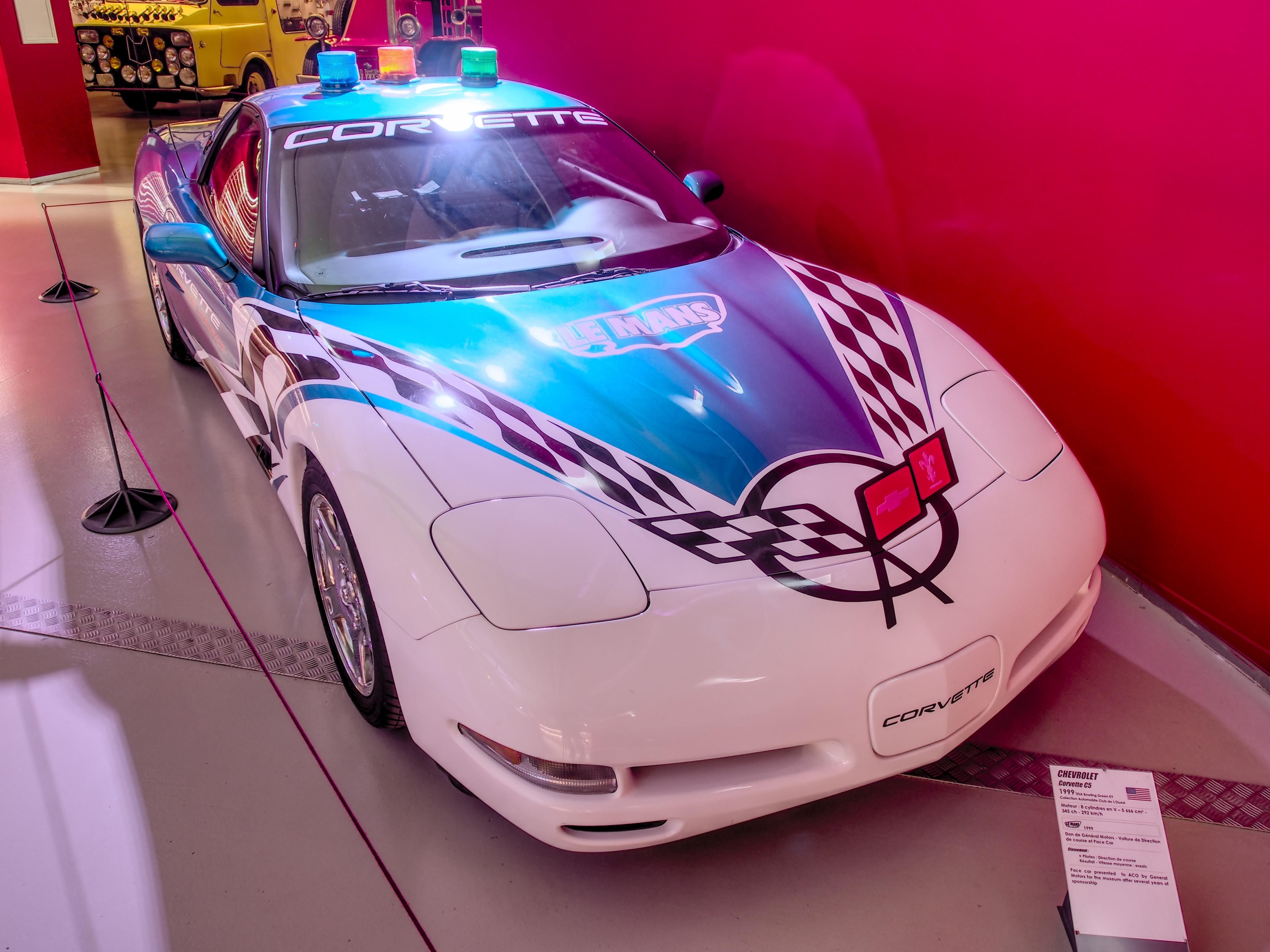 Photographed at Musée des 24 Heures du Mans, France.